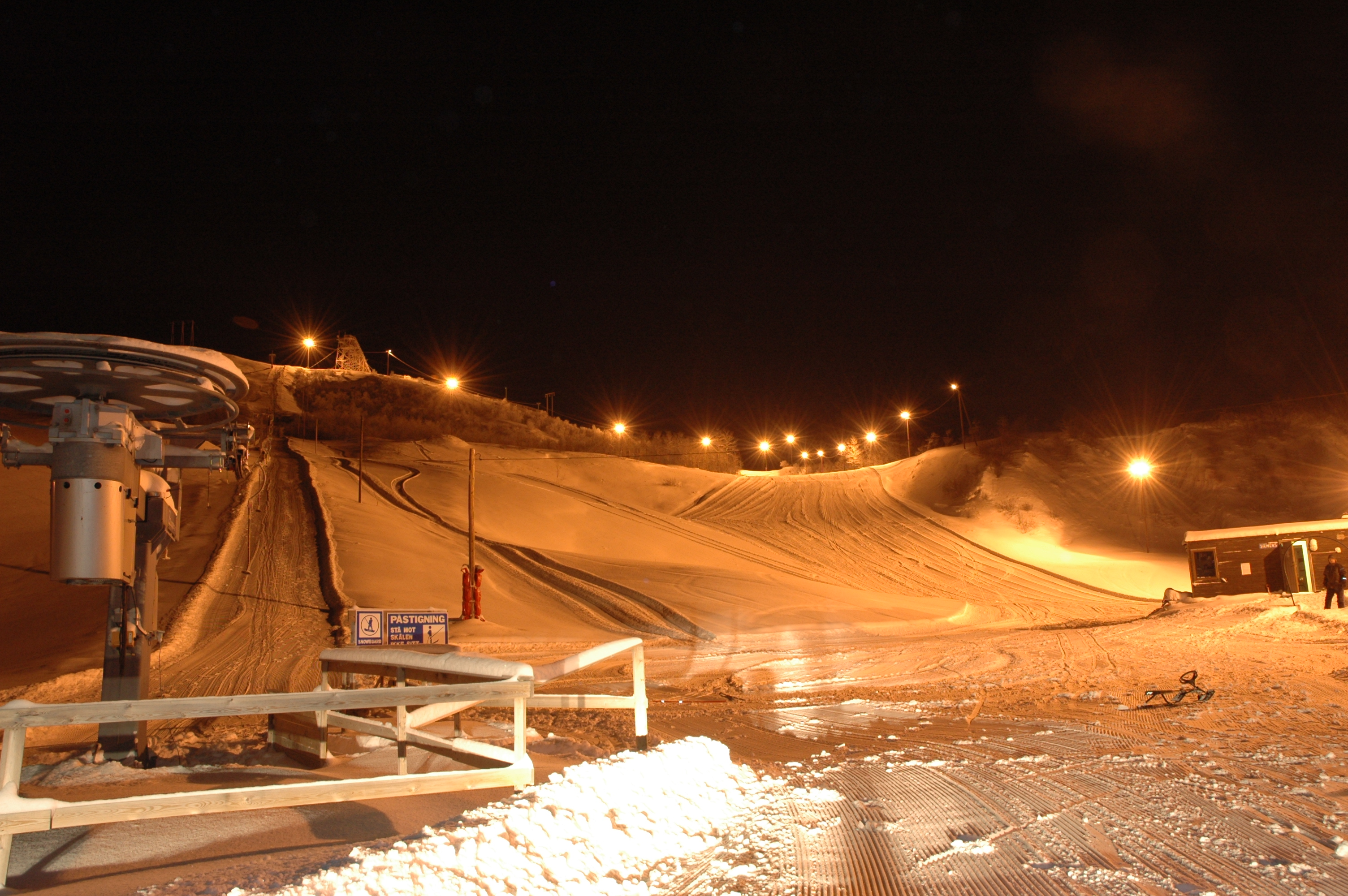 Sandnes Alpinsenter, Kirkenes, Sør-Varanger, skibakke, doppelmayr